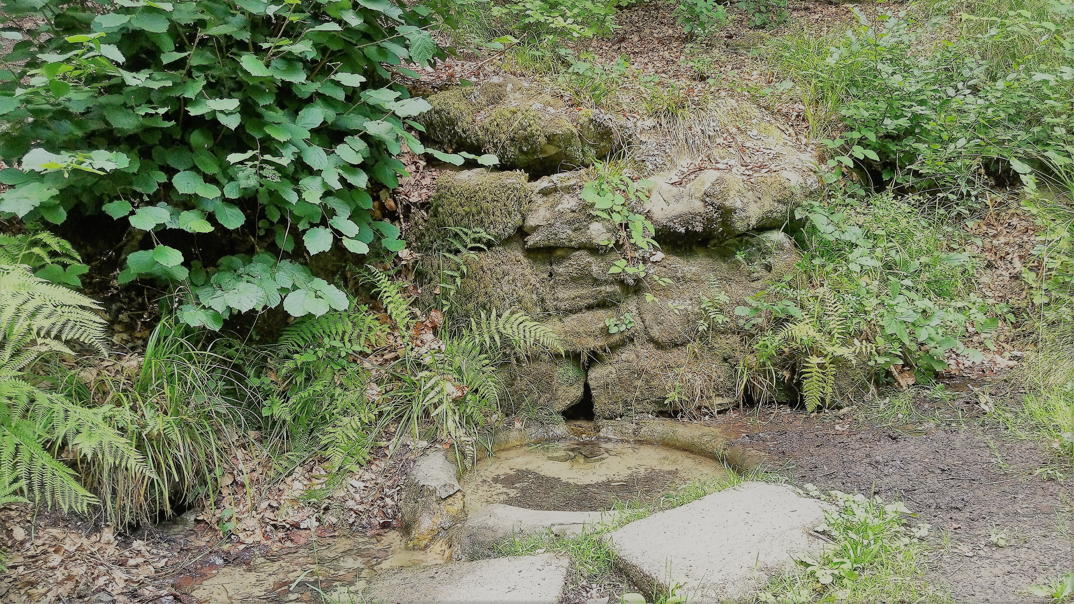 Luxembourg, commune de Steinsel. La source du Schetzelbaach.